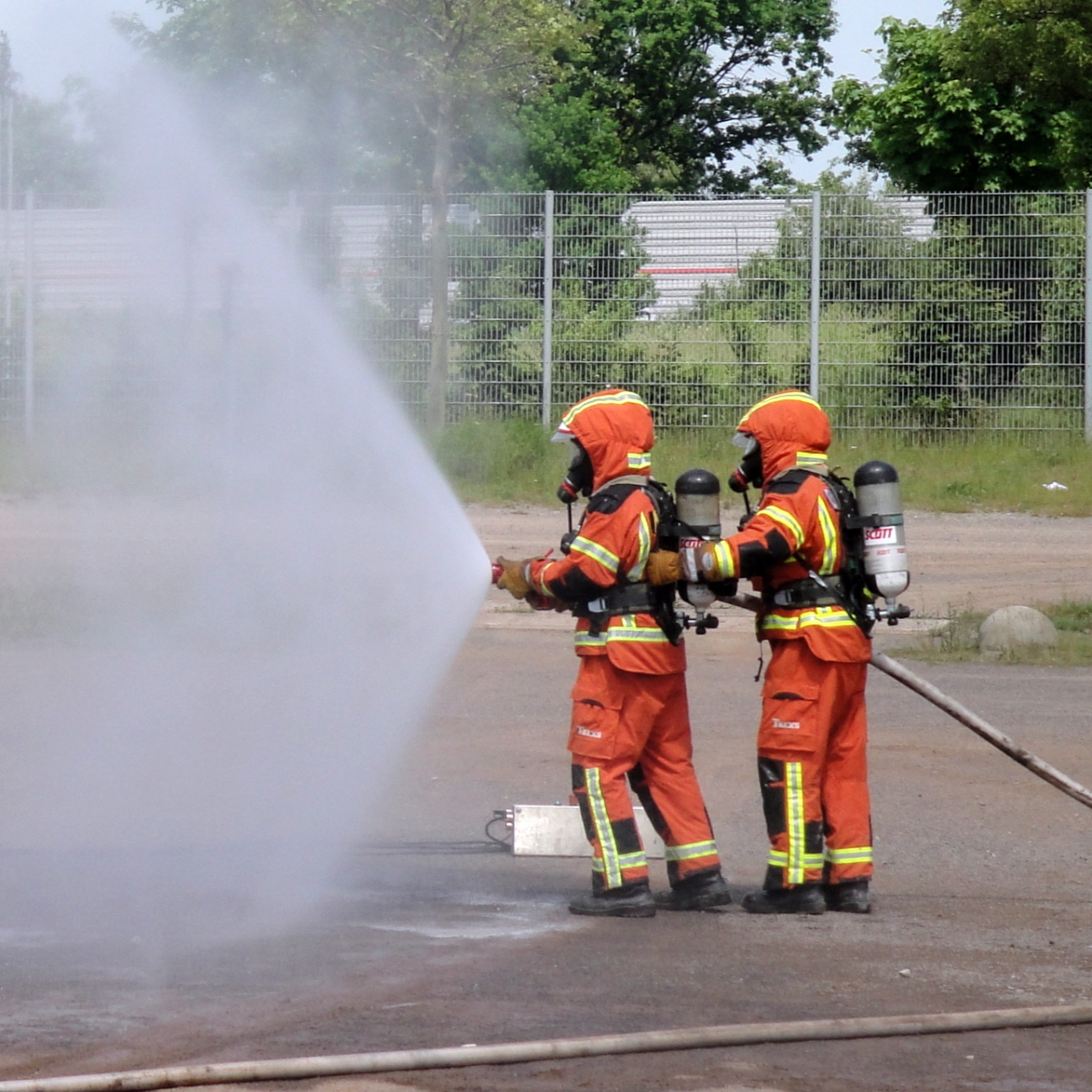 Vorführung Brandbekämpfung mit Hohlstrahlrohr, Interschutz 2010